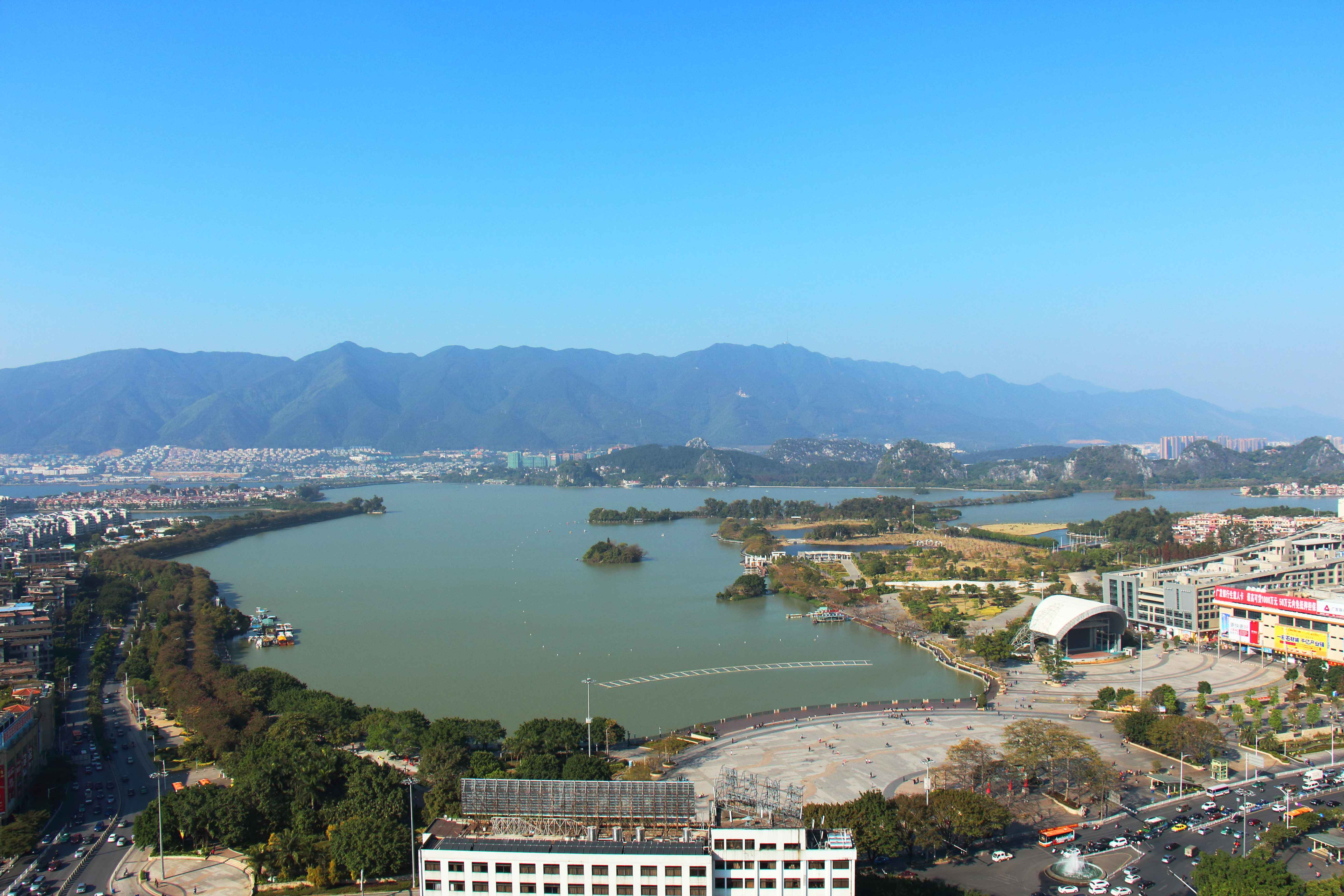 中文（中国大陆）: 牌坊广场全景 in Seven Star Lake (肇庆星湖), Zhaoqing, Guangdong, China.